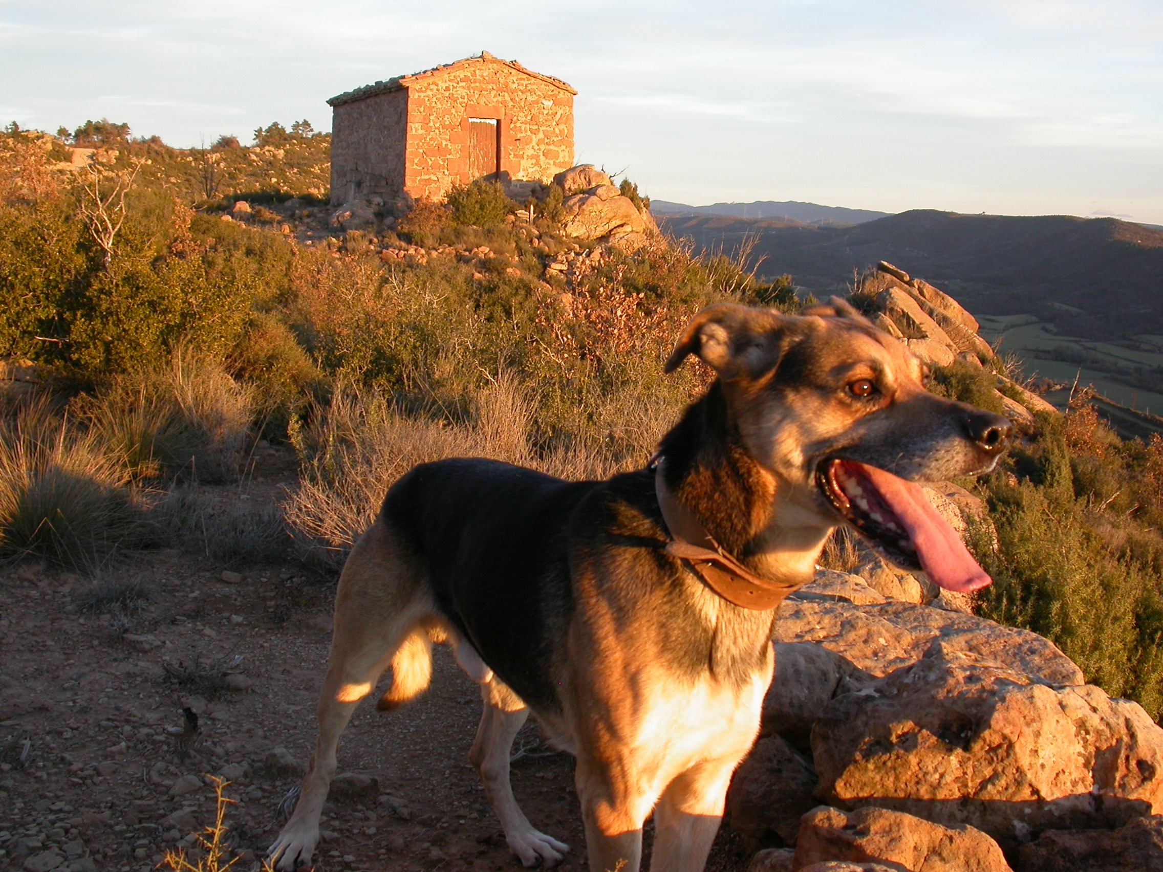 ( s XVIII-XIX) situada a l'extrem sud-oest de la serra del mateix nom.